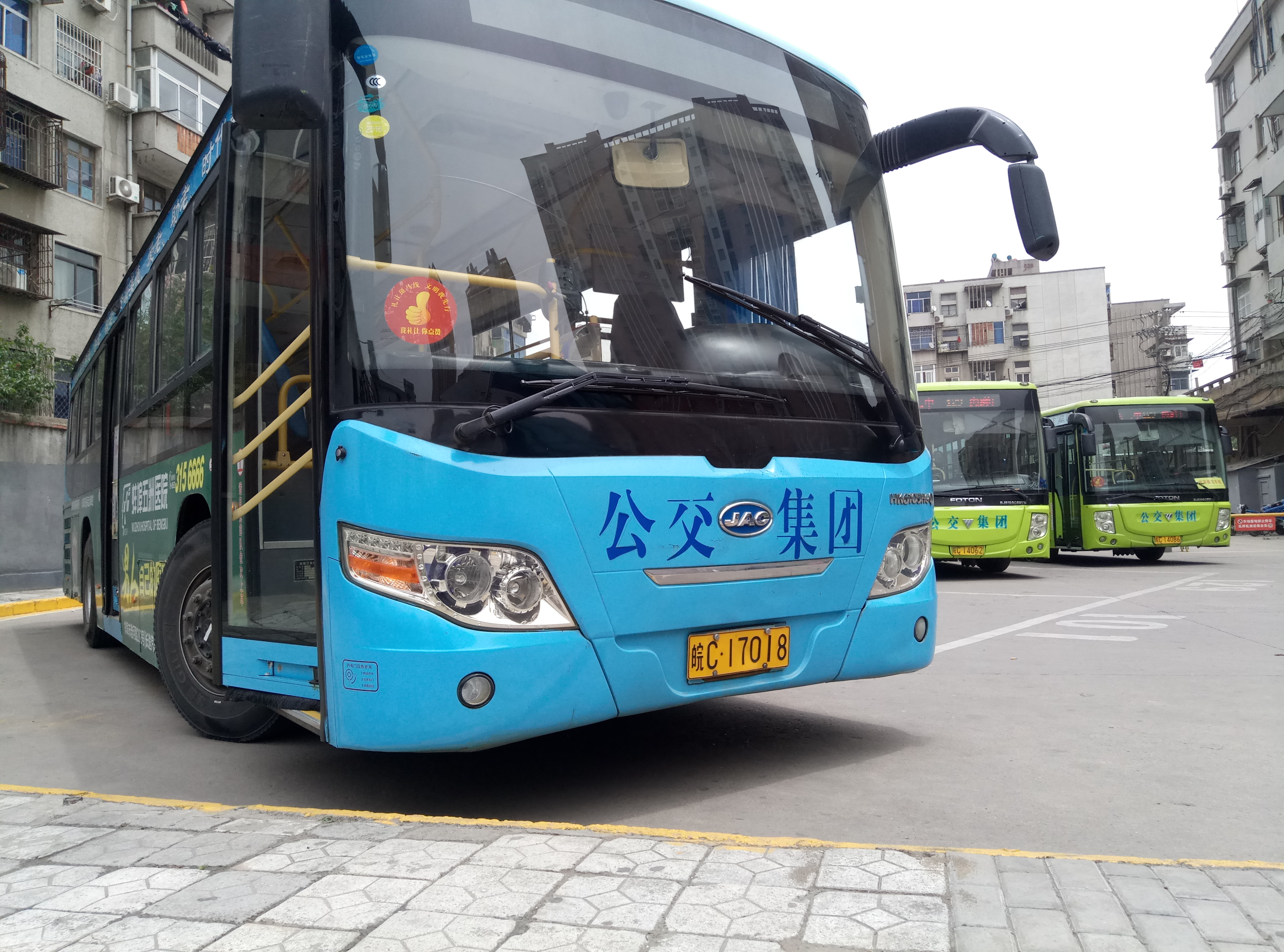 蚌埠市龙子湖区肉联厂 127路 肉联厂-新二中首末站 江淮客车 HK6105HGQ CNG